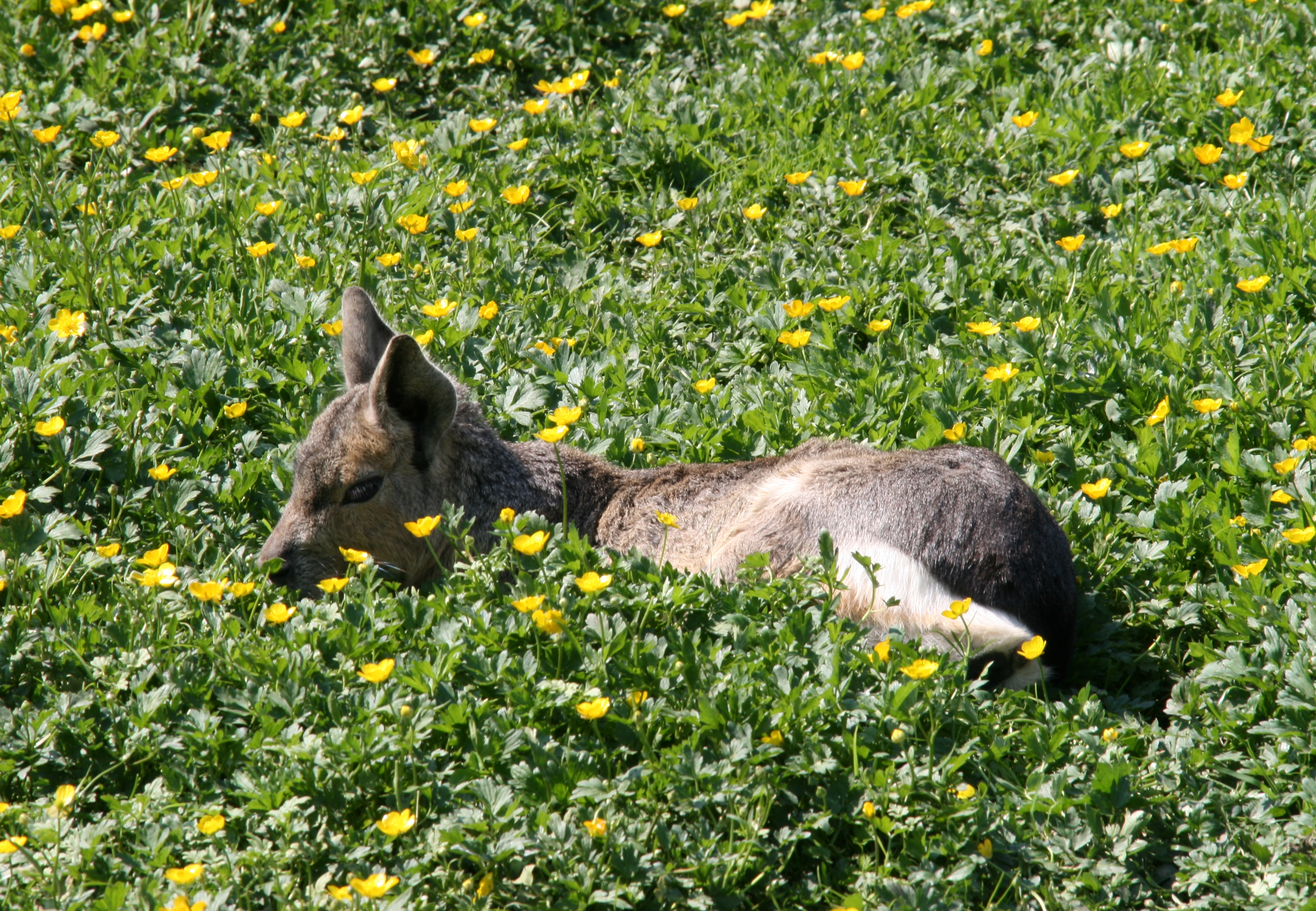 Die Pampashasen oder Maras (Dolichotinae) bilden eine Unterfamilie der Meerschweinchen in der Ordnung der Nagetiere.